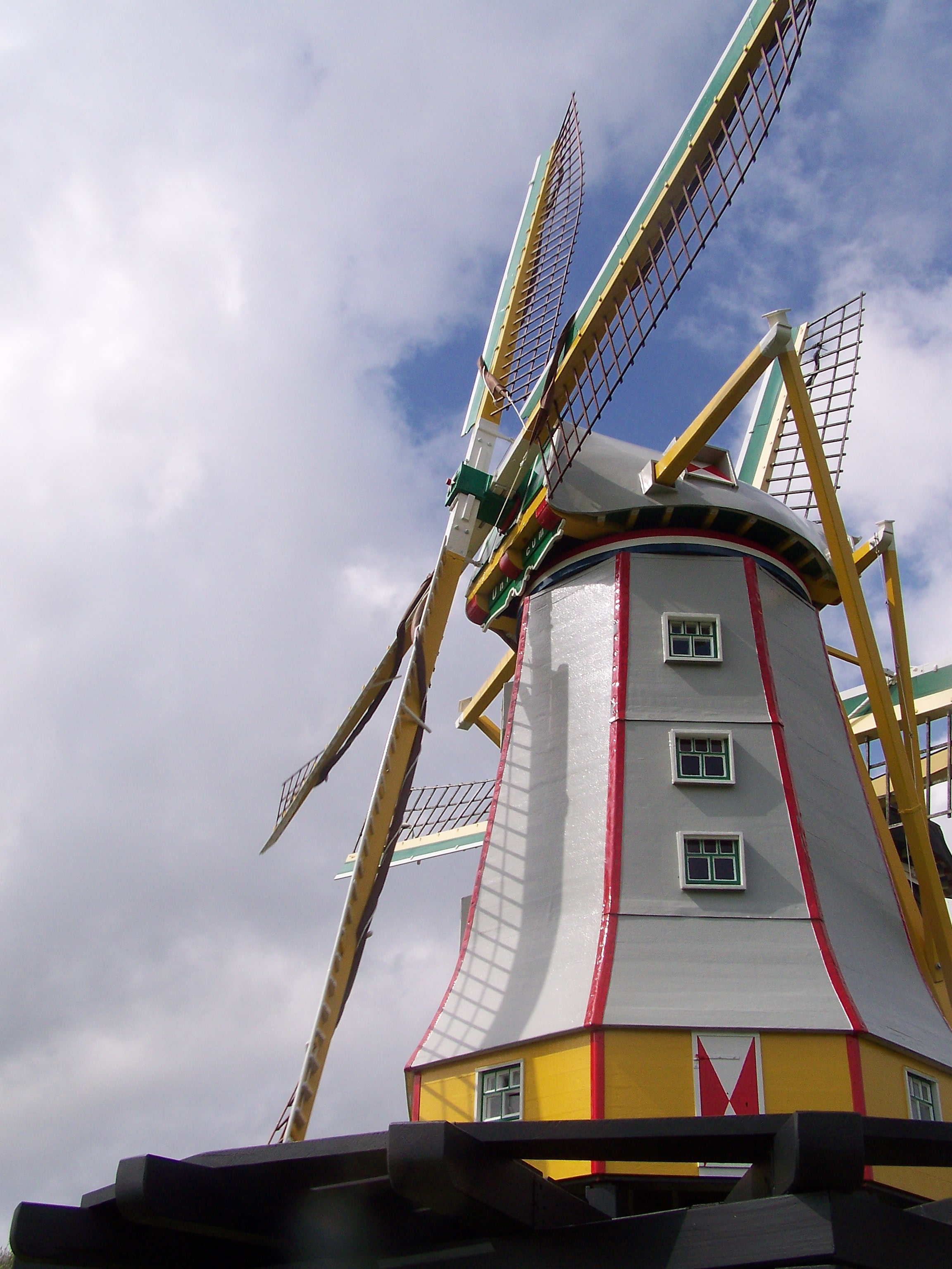 Modelmolen Unicum, op het molenerf van de Aagtekerkse Molen